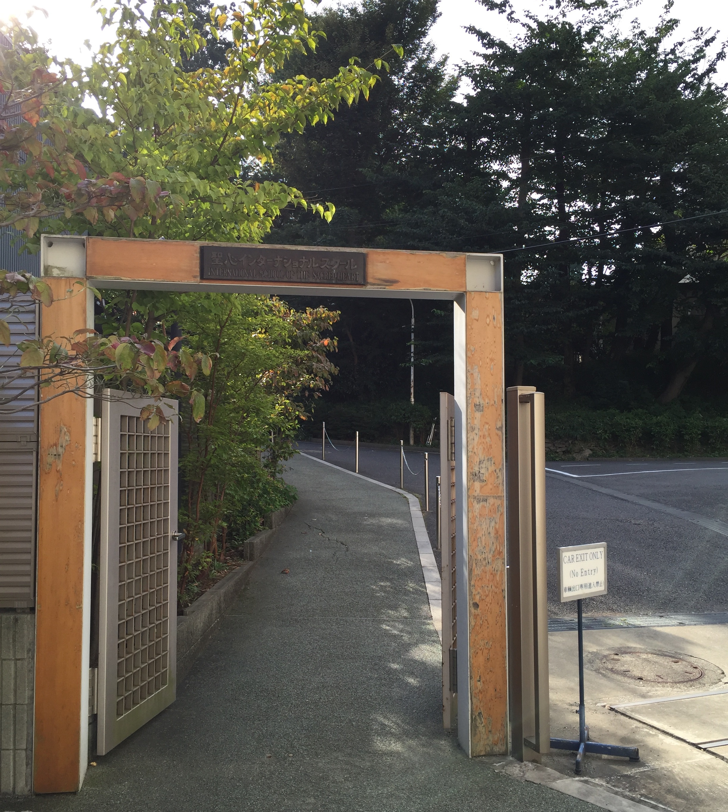 聖心インターナショナルスクール入口